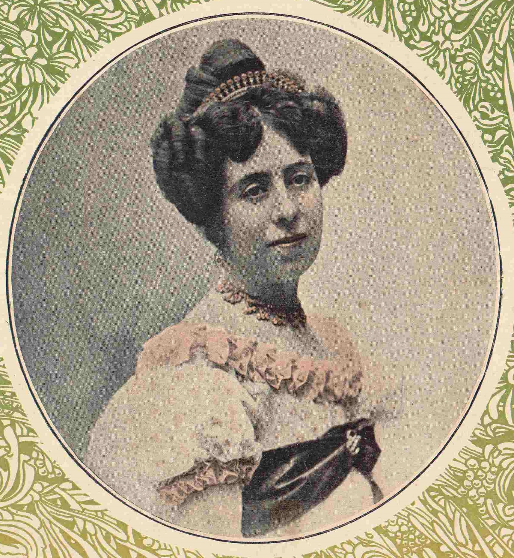 Matilde de Lerma. fotografía de Franzen.